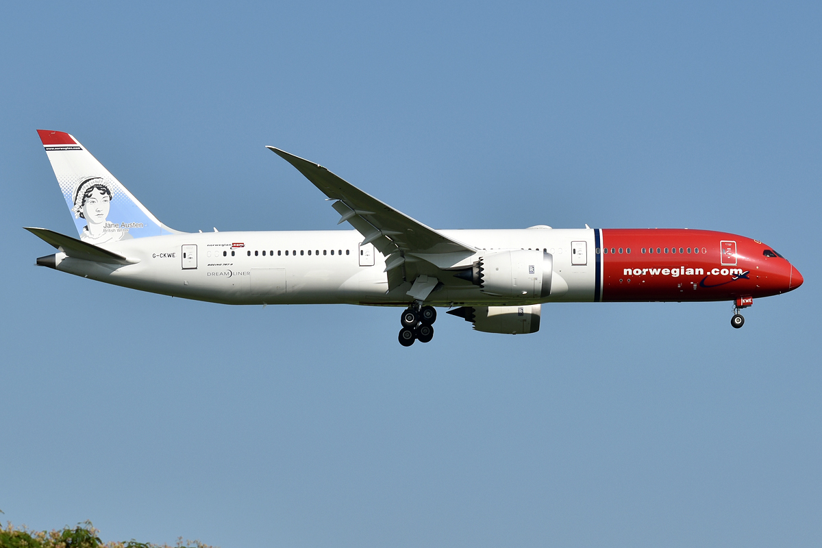 Norwegian, G-CKWE, Boeing 787-9 Dreamliner